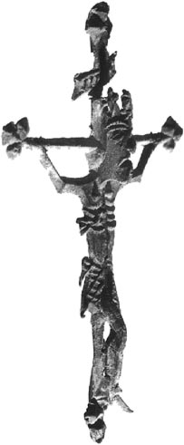 Kruzifix von der Unterburg Kyffhausen (Pilgerzeichen?)